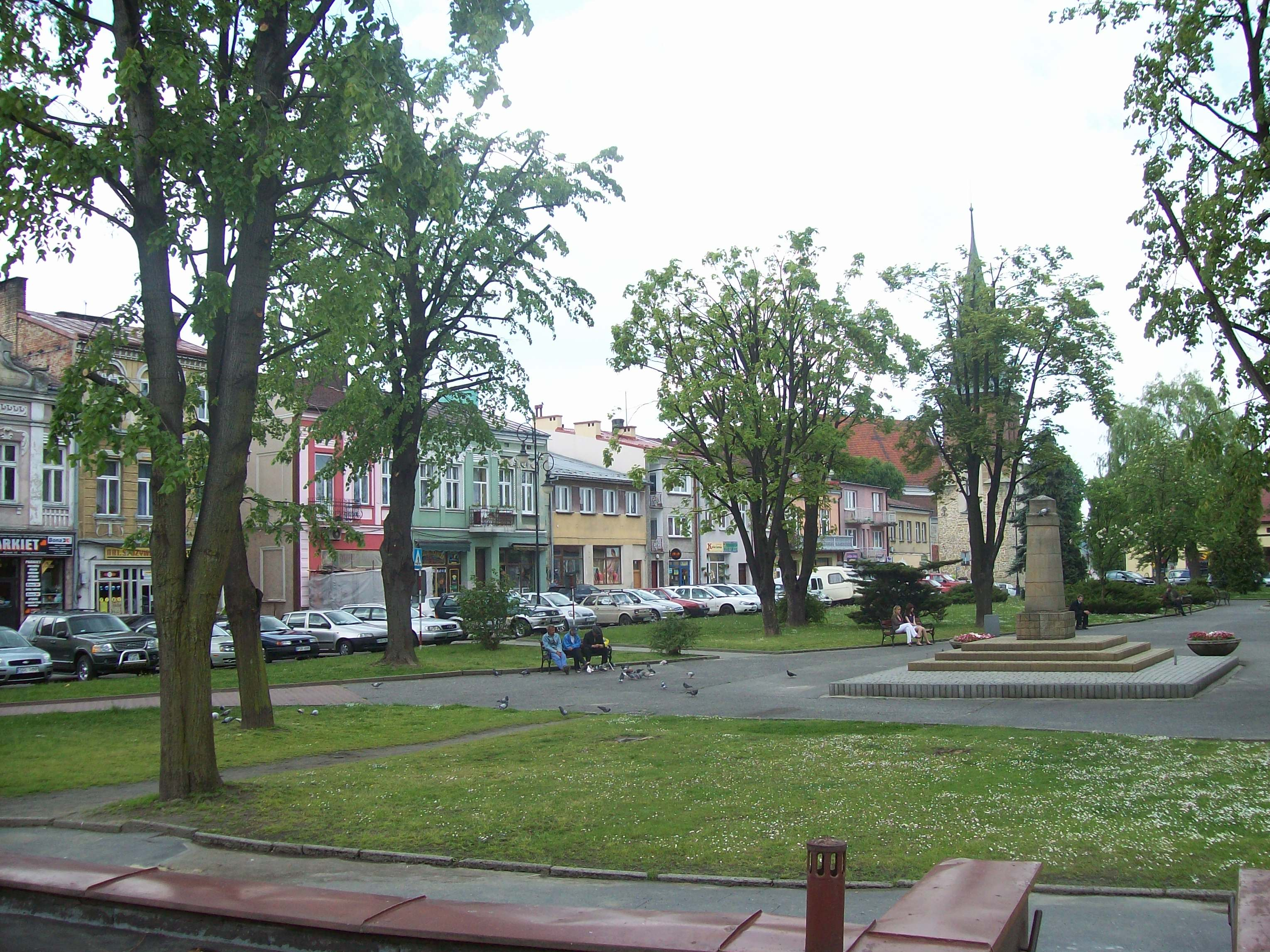 Rynek w Strzyżowie.